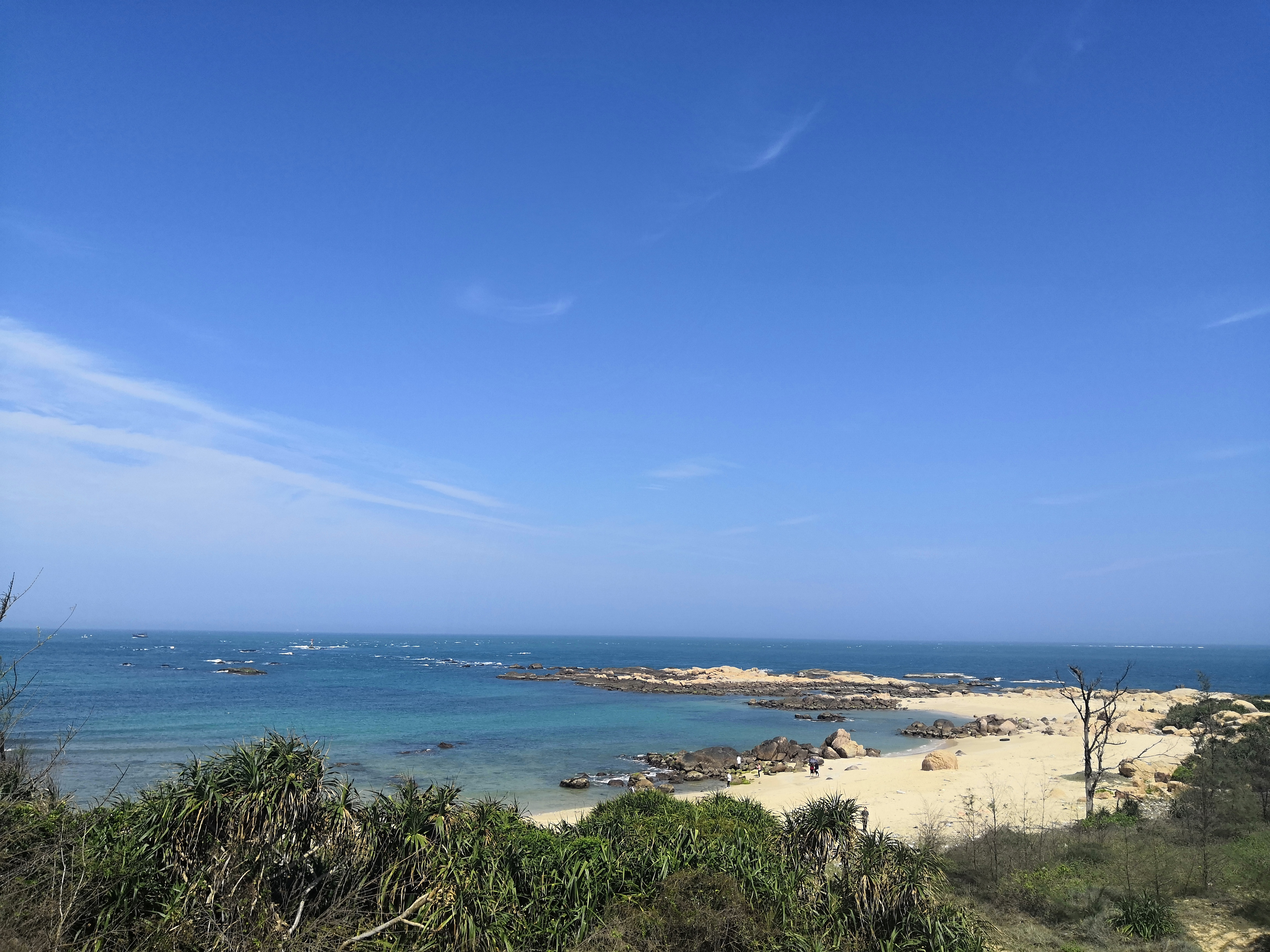 海滩